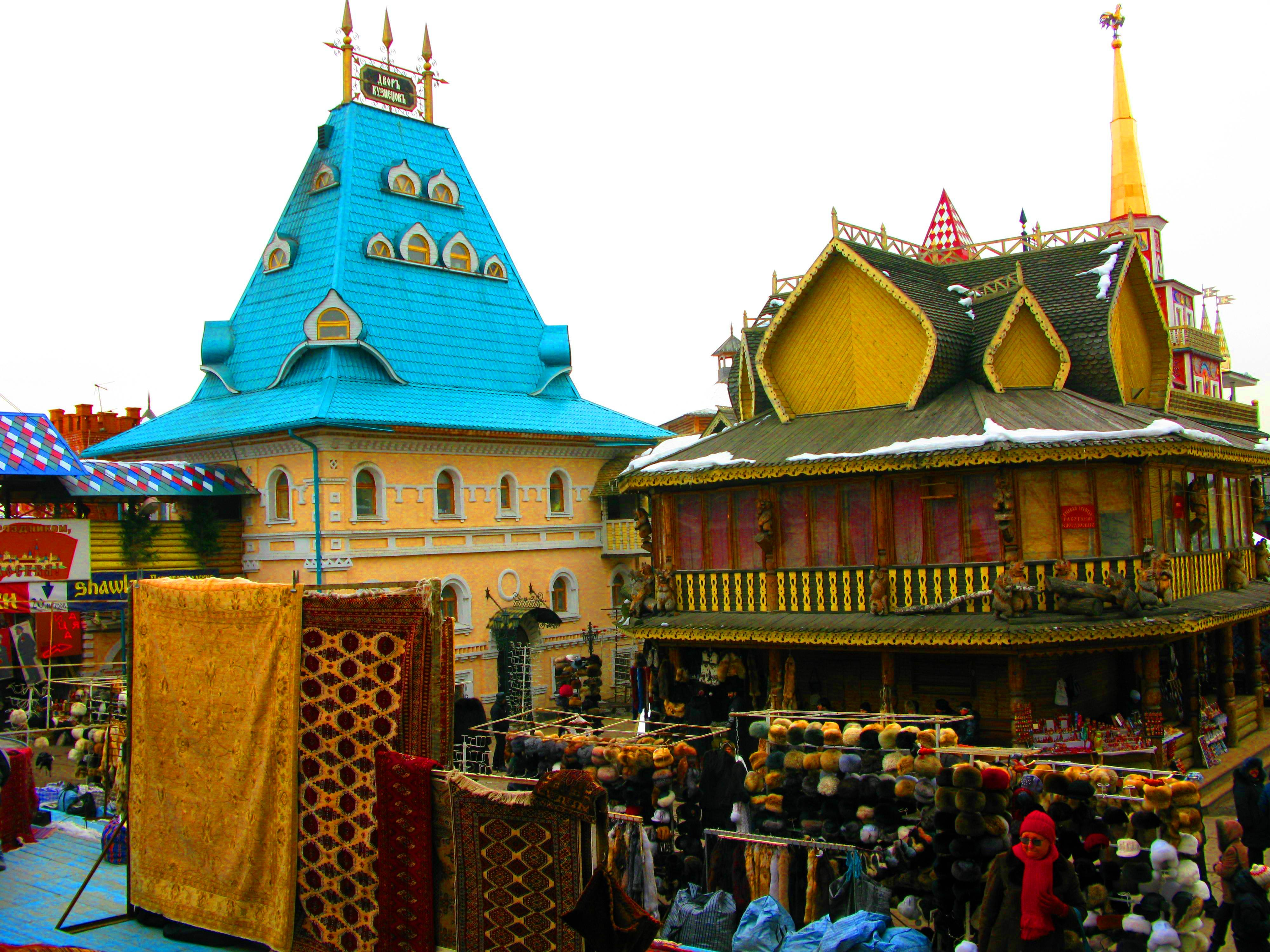 Метро Партизанская, Город мастеров, Москва, Россия